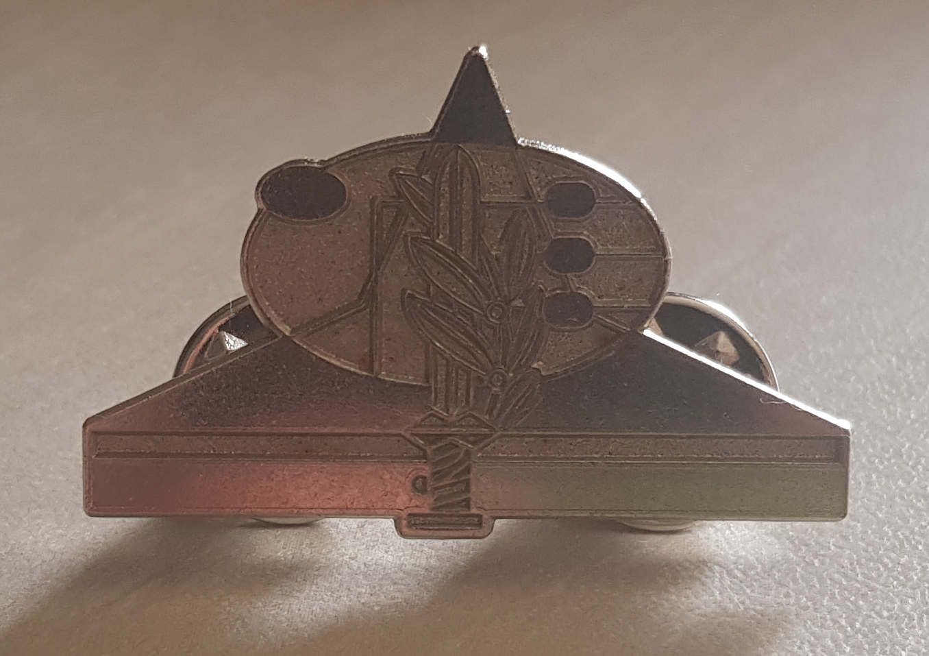 סיכת בוגר של תוכנית פסגות